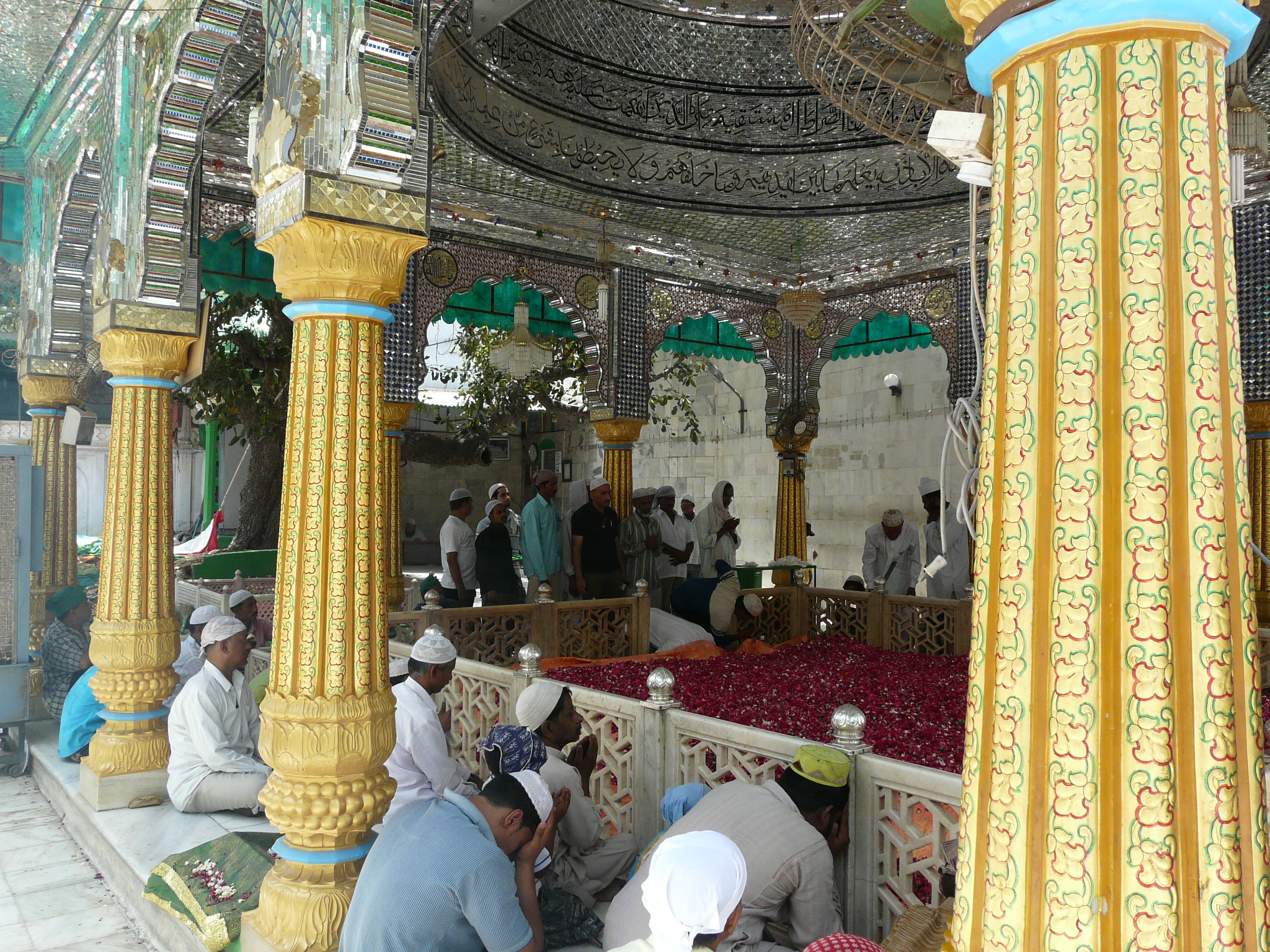 Qutbuddin Bakhtiyar Kaki's tomb. Mehrauli.